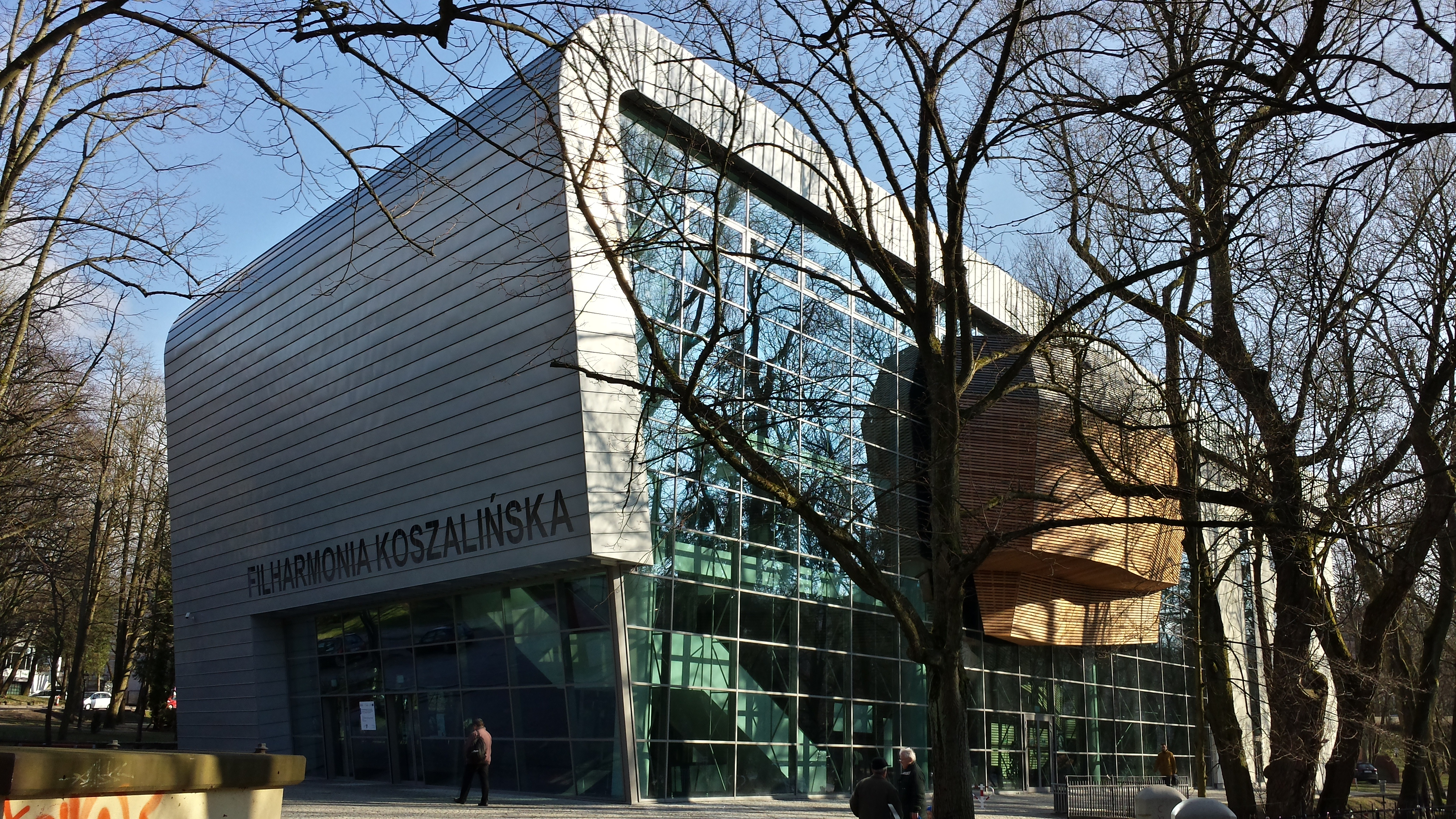 Budynek Filharmonii Koszalińskiej, ul. Piastowska 2